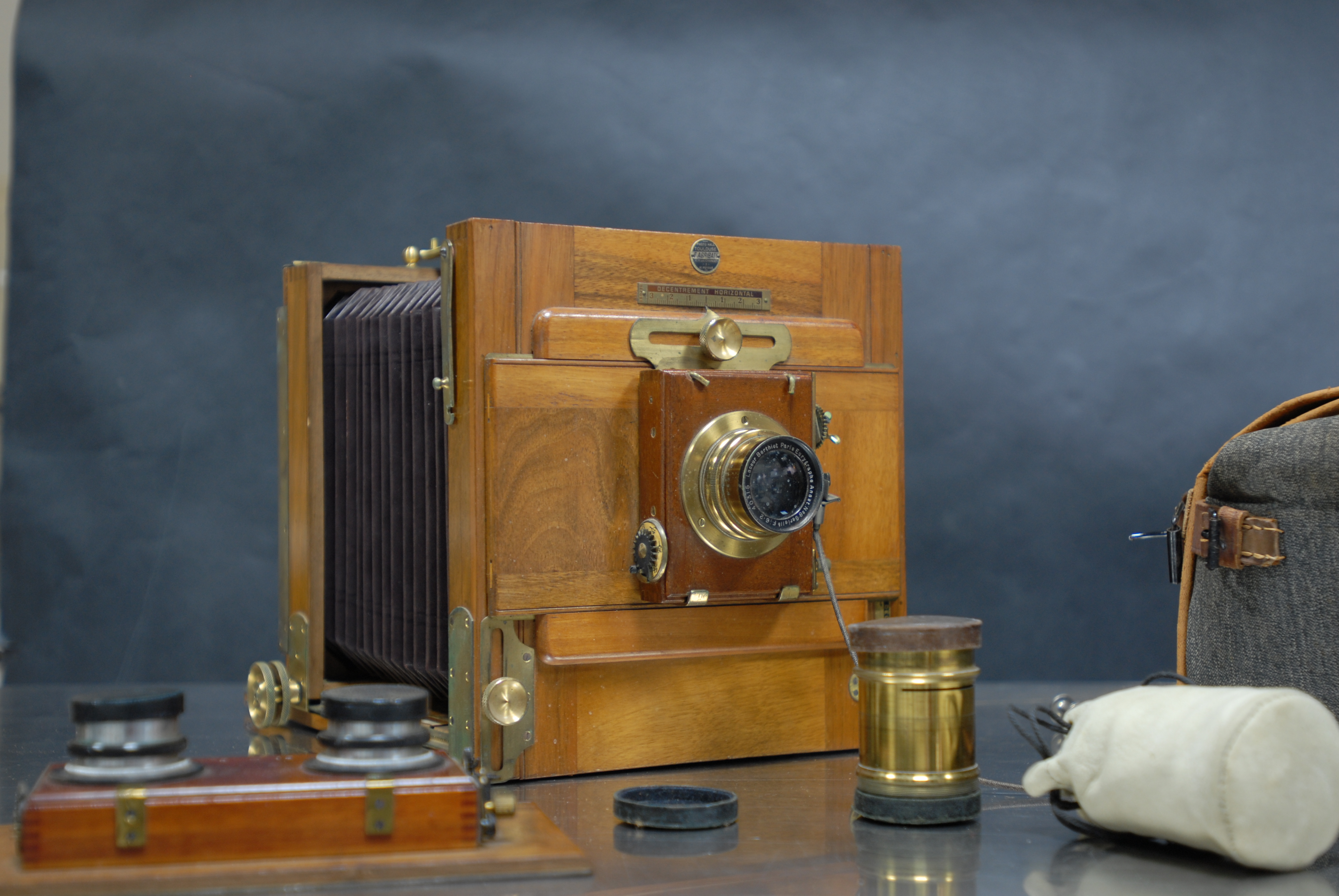 Chambre photographique de voyage, Fabrication : Chambre : Photo -Hall (Toulouse). Objectifs : Berthiot. Rideau : Thornton Pickard, XIXe siècle. Chambre pour plaque 13 x 18 cm (Plaque gravée en laiton : « Photo –Hall – Toulouse – E. Abribat – 30, rue des Changes– 2, rue Peyras »). Soufflet, glace dépolie à charnières, double décentrement indexé de la planchette d’objectif. L’appareil dispose d’une planchette avec un objectif anastigmate. Eurygraphe Berthiot No 8, série II b, F 1: 6,2, monté sur un obturateur à rideau pour la pose et l’instantané, ainsi que d’une planchette pour la stéréoscopie, avec deux objectifs Eurygraphes Berthiot No 5, série IVa, monté sur obturateur à rideau. L’équipement est contenu dans un sac en toile grise et comprend aussi un trépied en bois. Démontable.